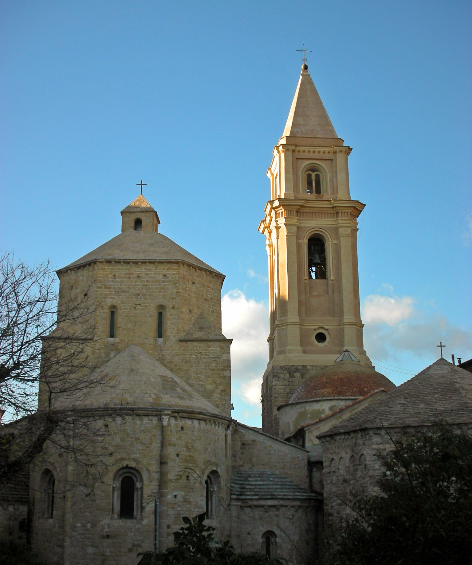 Abside della cattedrale di Ventimiglia in Liguria, Italia.